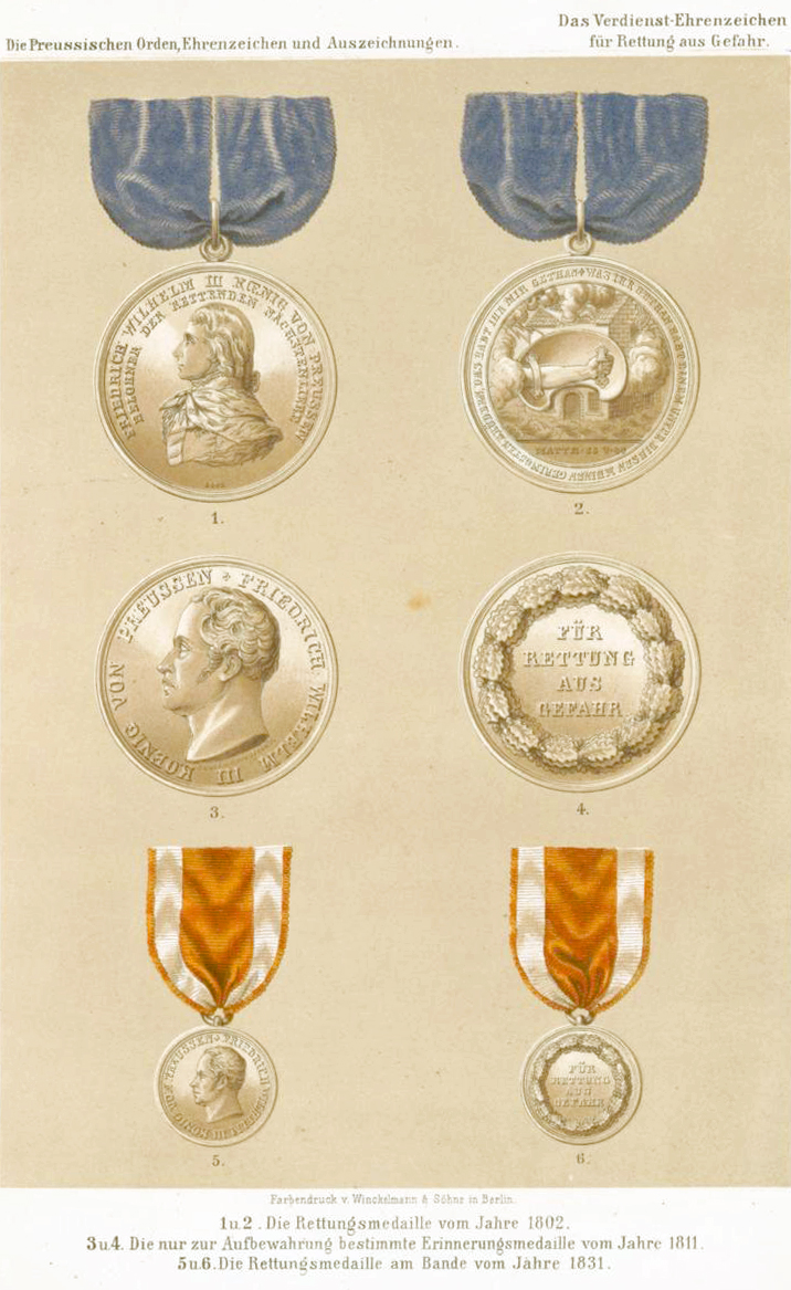 Die Preussischen Medaillen für Rettung aus Gefahr